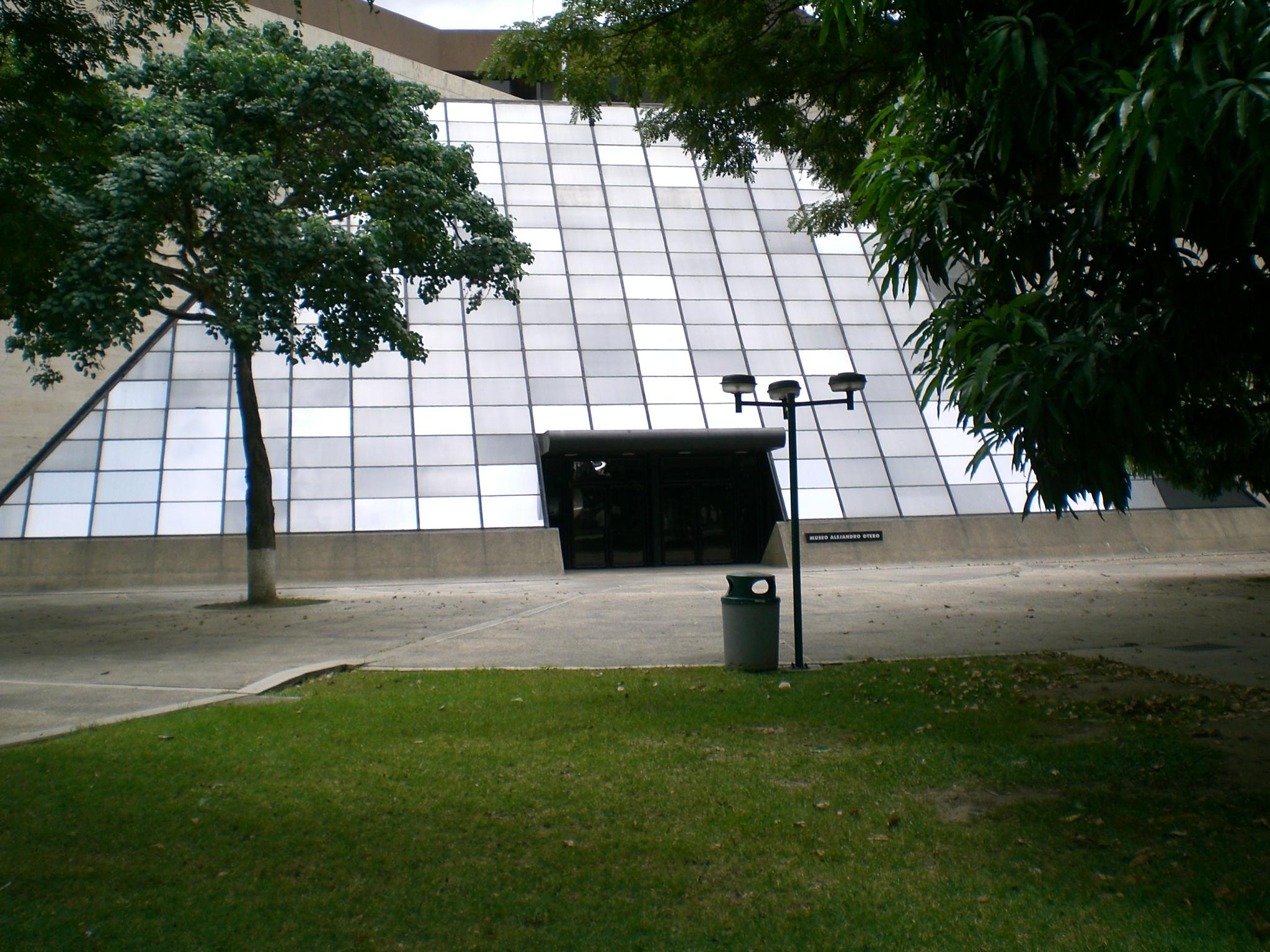 Alejandro Otero Museum, Caracas, Venezuela